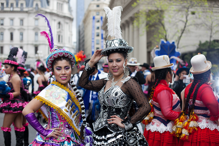 Fotos del desfile por la Integracion Cultural de la comunidad boliviana en Buenos Aires, Argentina (2015)